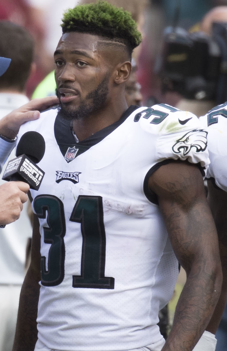 Eagles at Redskins 9/10/17